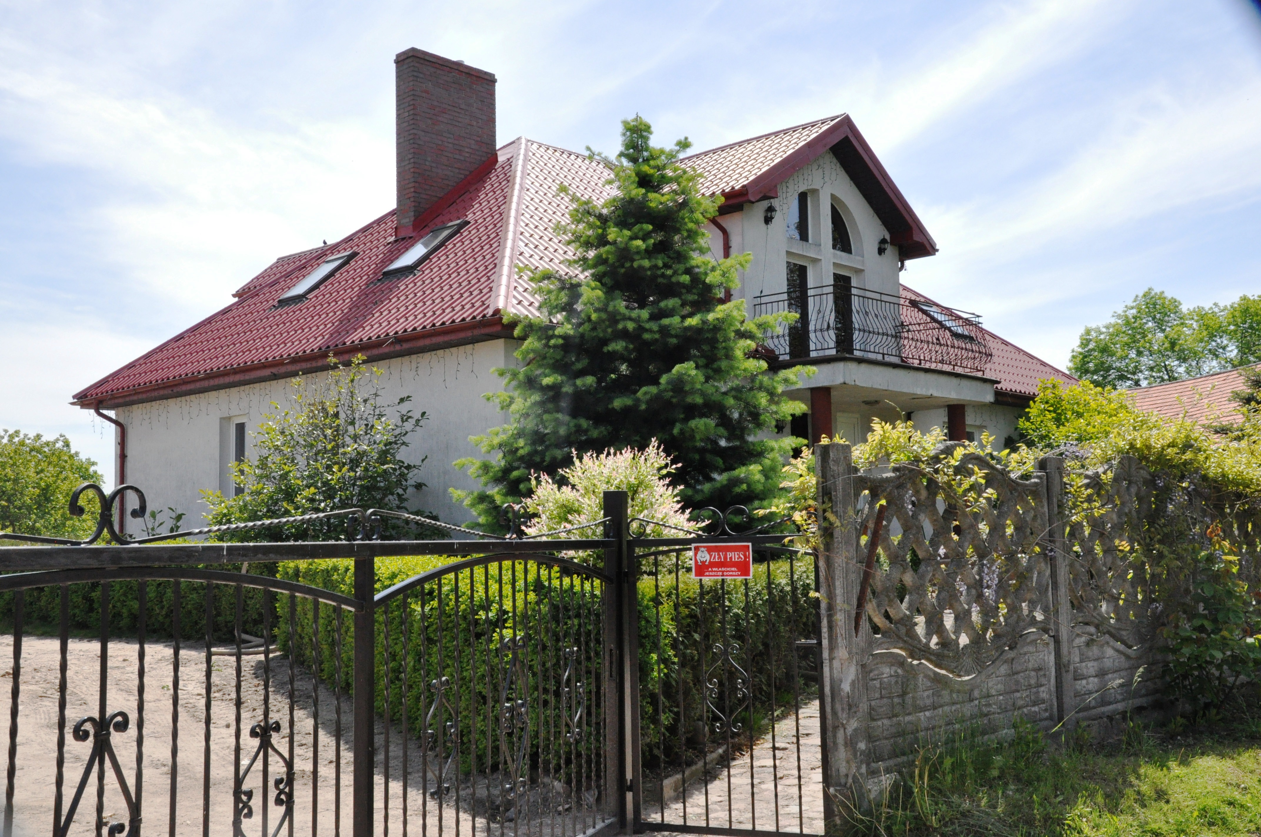 Strażnica WOP Krajnik Górny - zdjęcie z okresu późniejszego